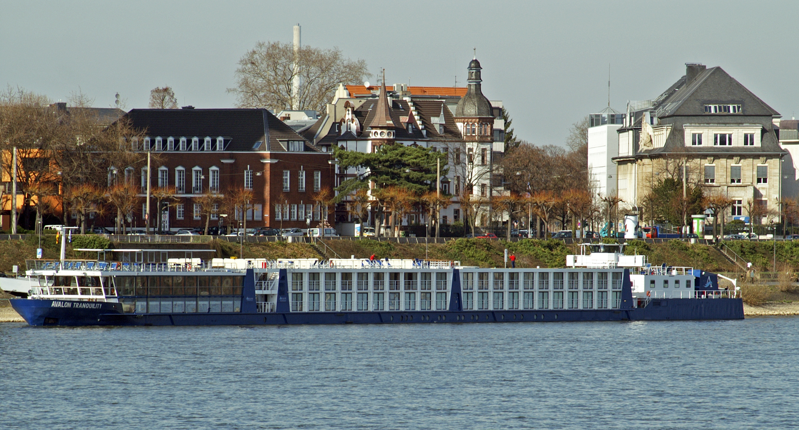 TwinCruiser Avalon Tranquility am Anleger in Köln.